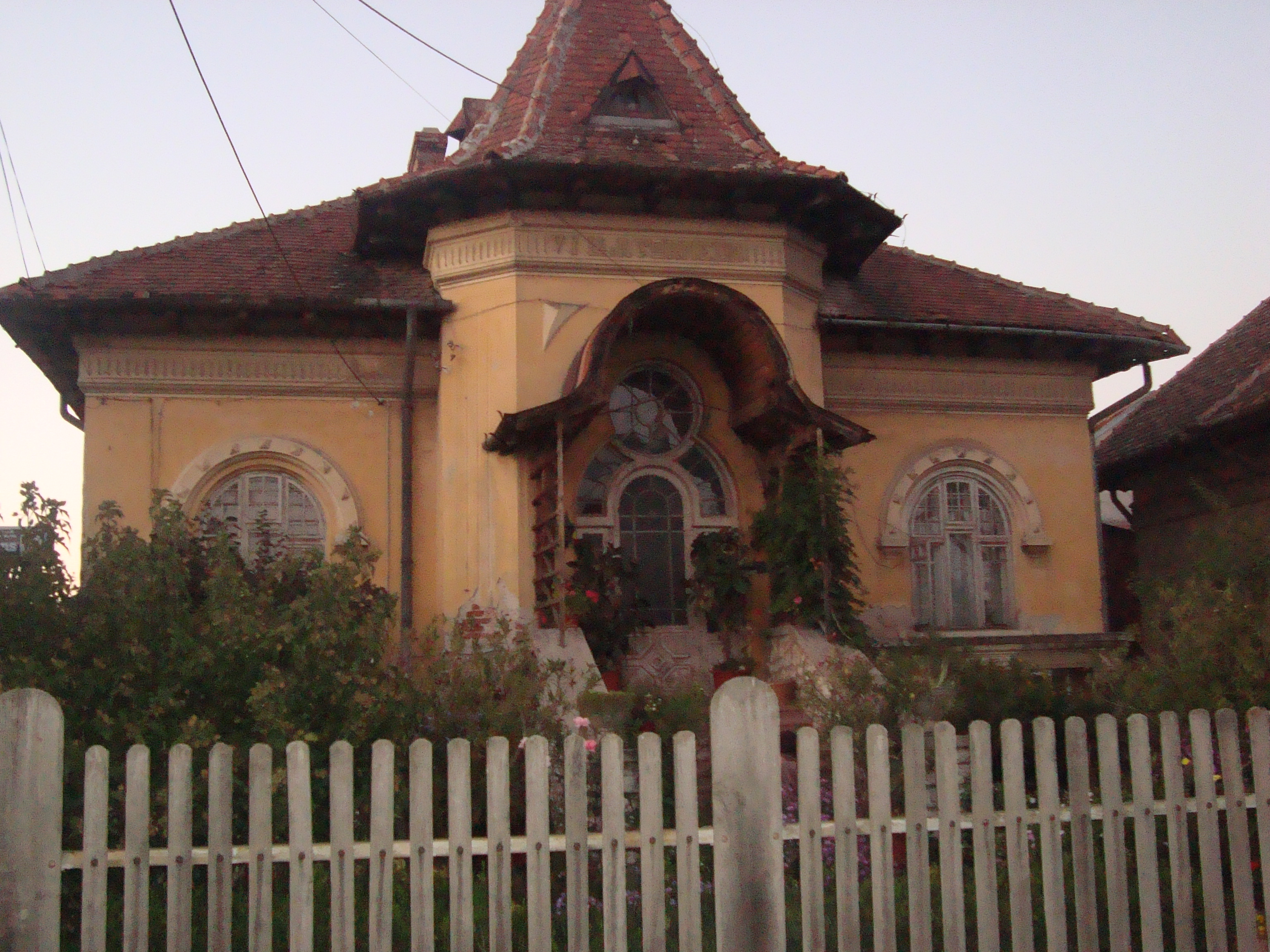 Casa Pleniceanu Dan